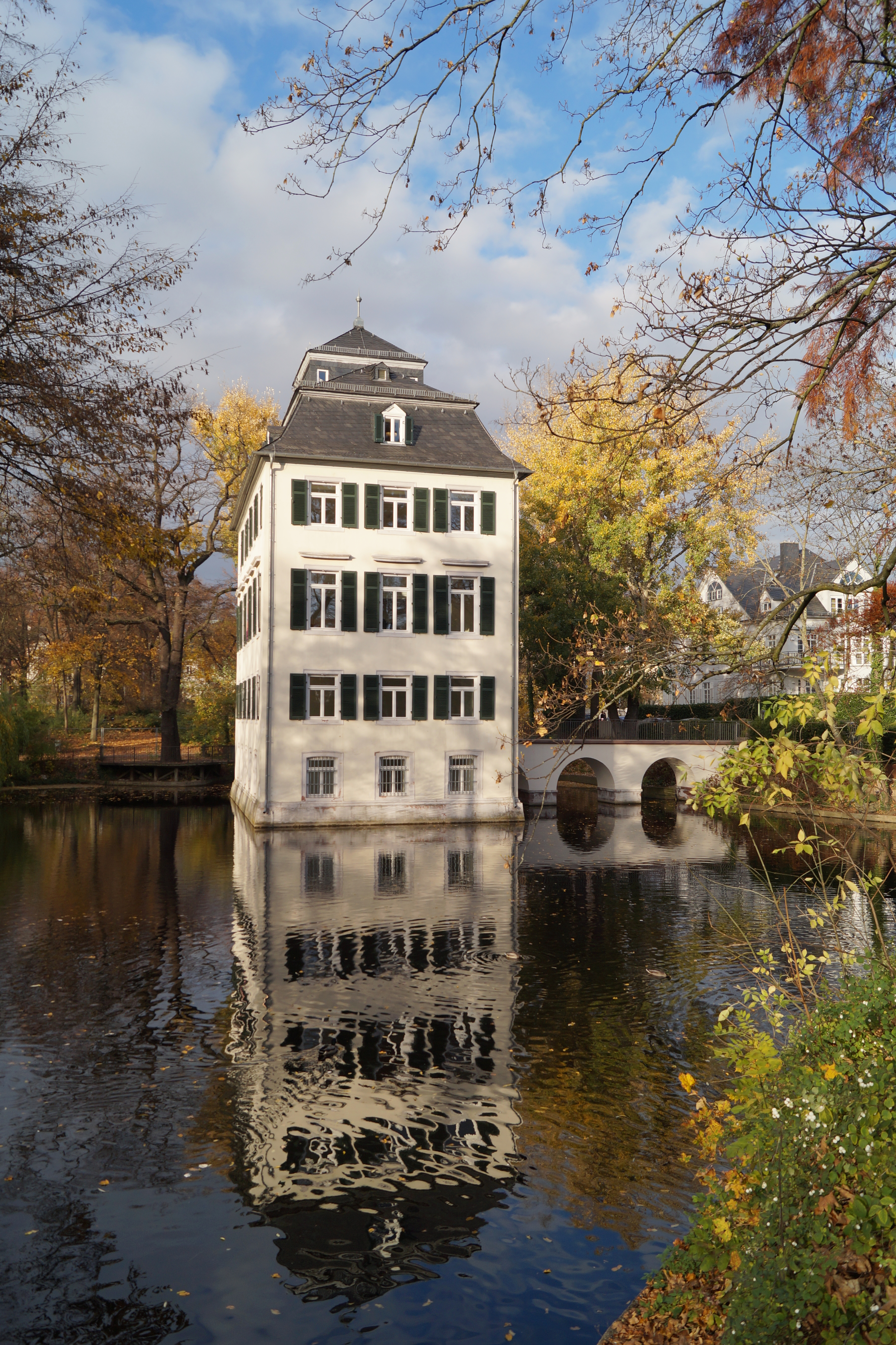 Holzhausenschlösschen in Frankfurt a.M., Ansicht von Südsüdwesten.